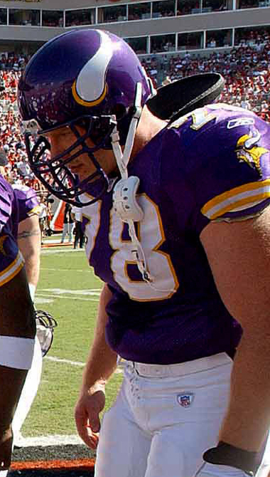 Matt Birk at the beginnig of Viking at Bucaneers 2002